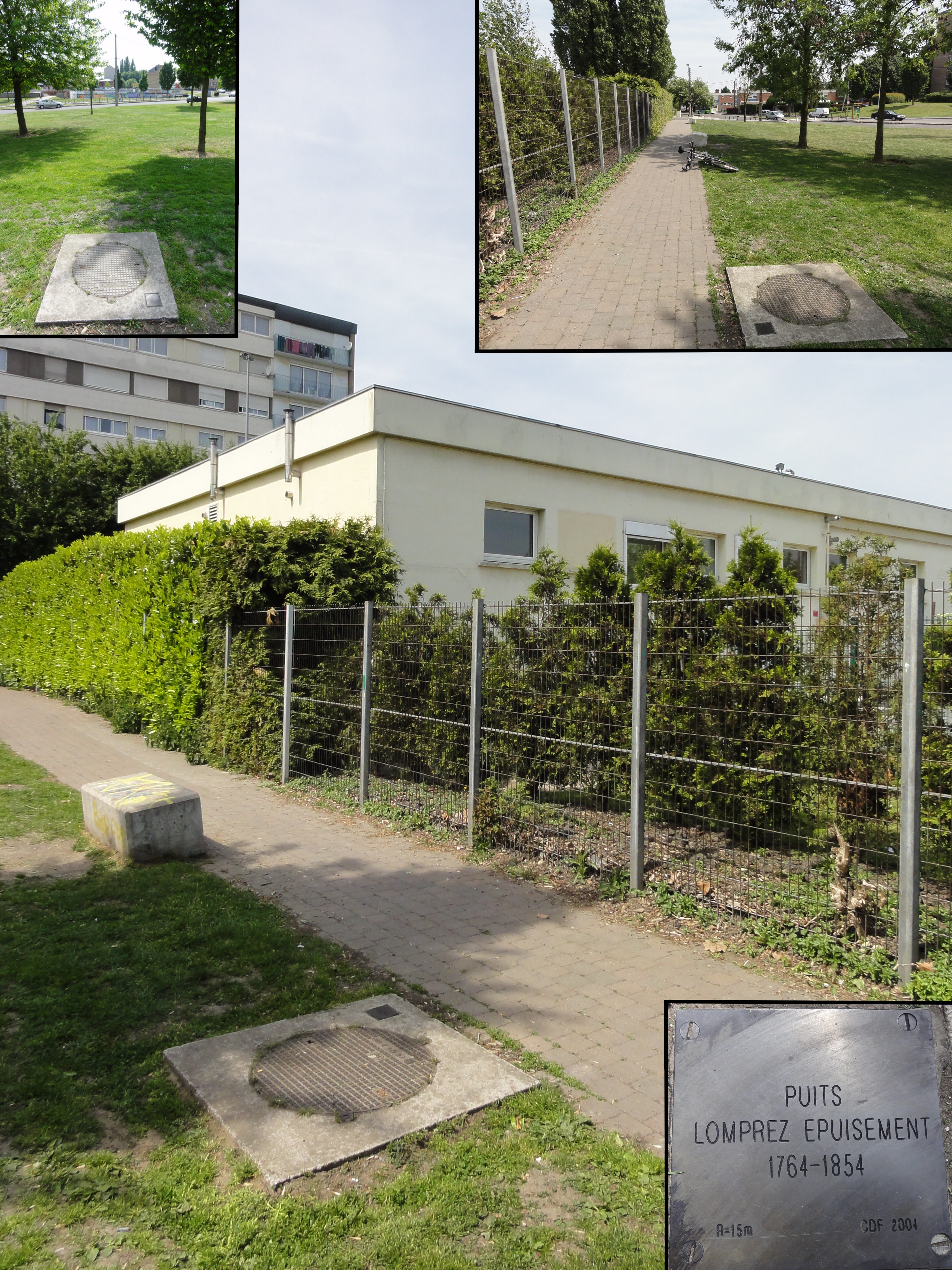 La Fosse Lomprez de la Compagnie des mines d'Anzin était un charbonnage constitué de deux puits situé à Valenciennes, Nord, Nord-Pas-de-Calais, France.